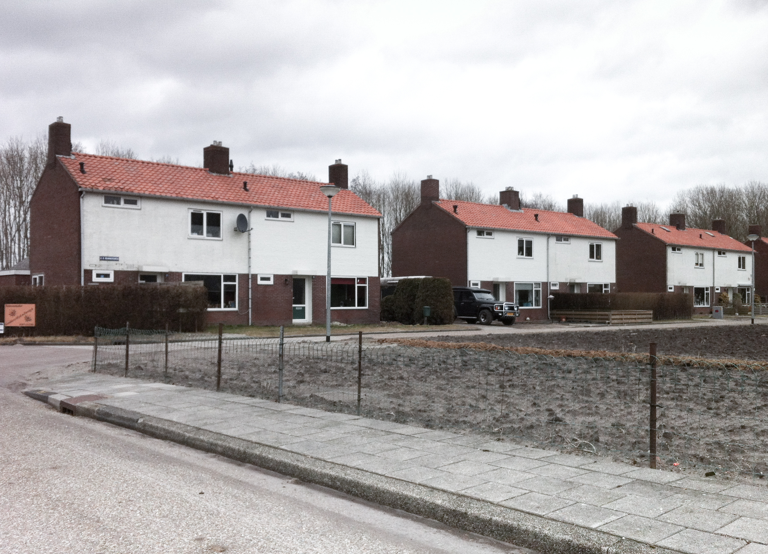 Gerenoveerde huizen aan de H.R. Remmersweg Ganzedijk. Op de voorgrond moestuinen. De huizen zouden in eerste instantie worden gesloopt en zijn alleen van binnen gerenoveerd.